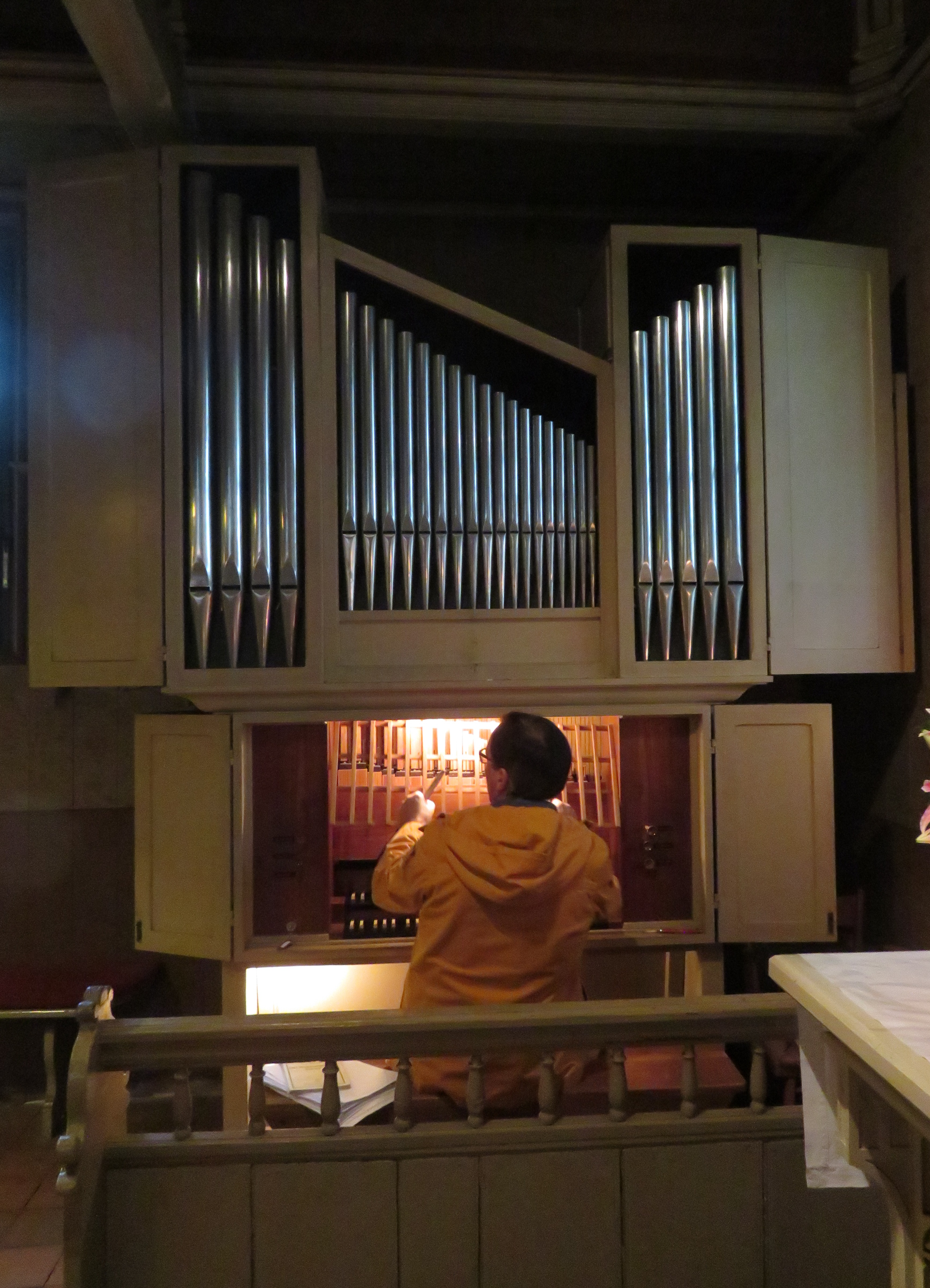 Alte Inselkirche Spiekeroog Orgel von Rudolf Janke (1961)